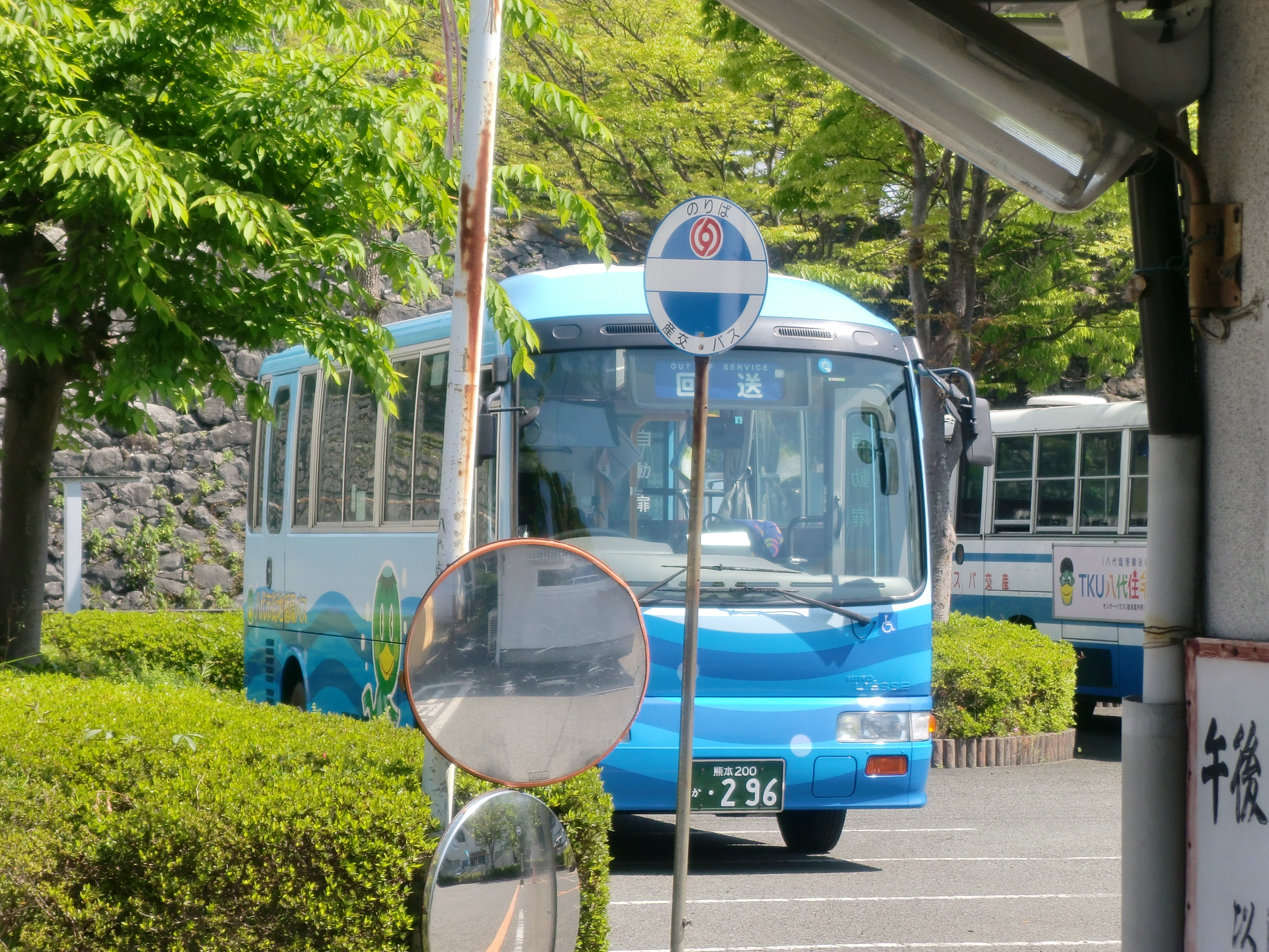 八代市街地循環バス（まちバス・みなバス）